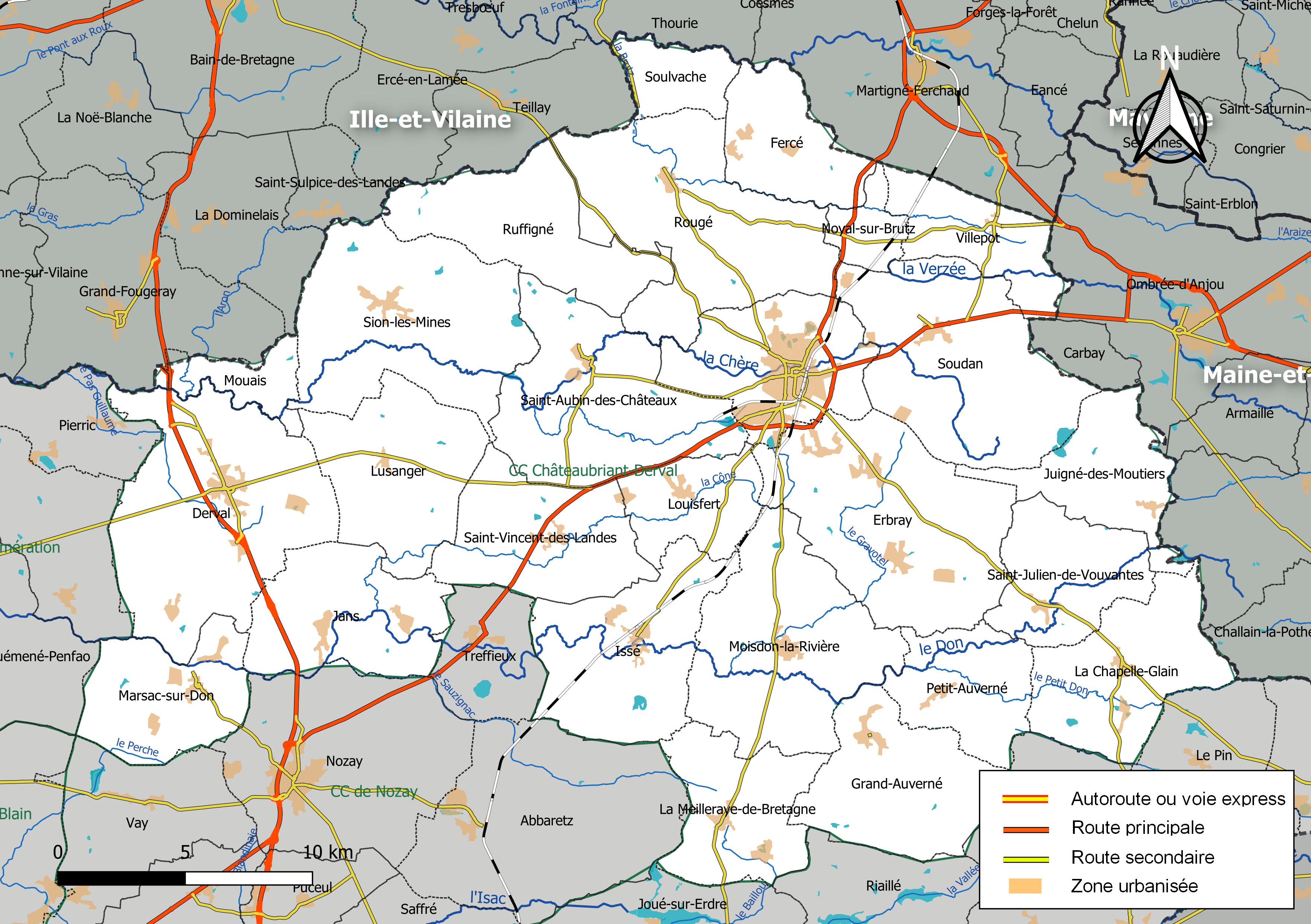 Carte géographique de la Communauté de communes Châteaubriant-Derval, département de la Loire-Atlantique, France. Composition au 1er janvier 2019.